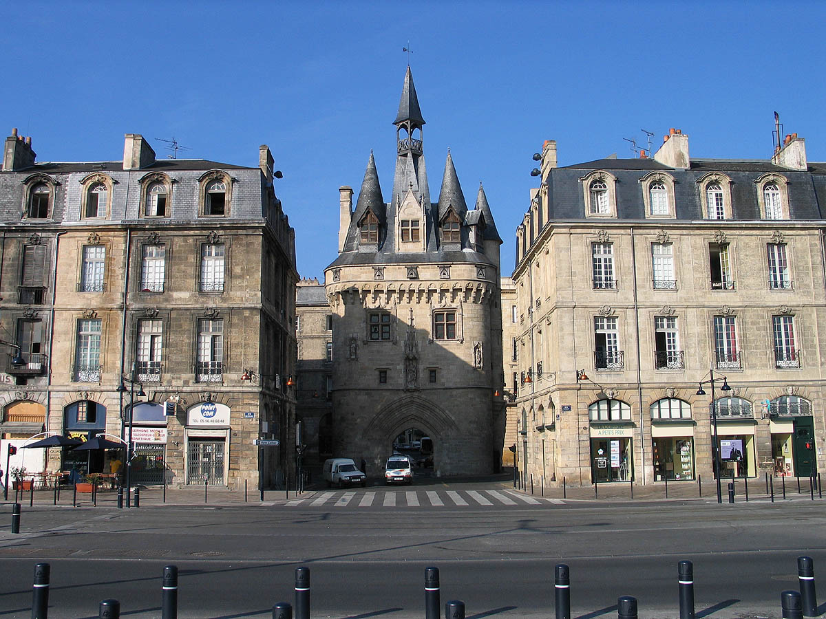 Porte Cailhau, Bordeaux, Frankreich, France Photograph Luidger (3. September 2005)